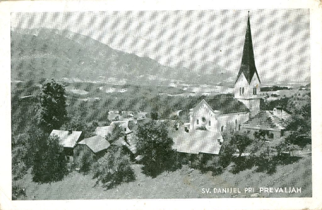 Razglednica Šentanela